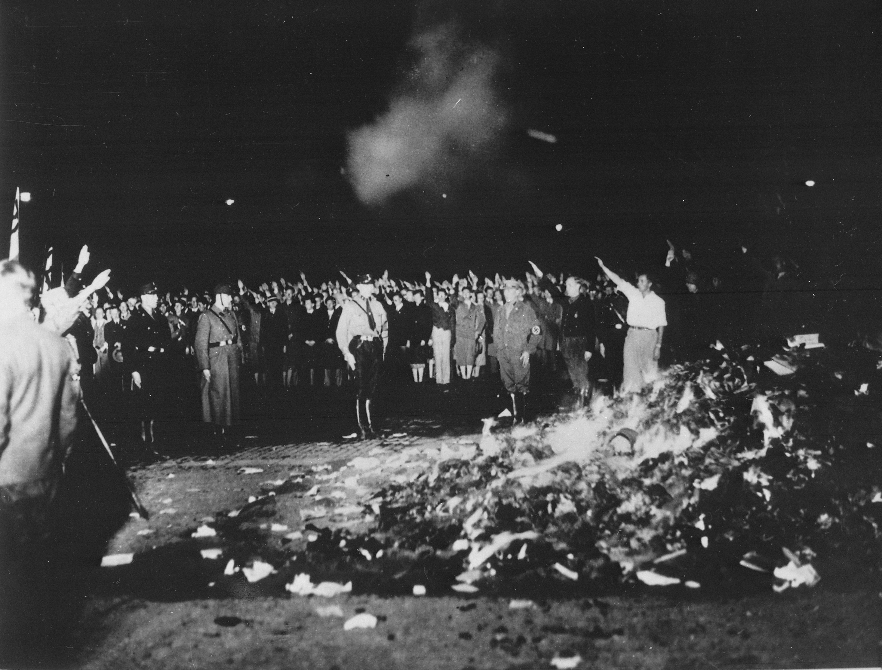 Die öffentliche Verbrennung undeutscher Schriften und Bücher auf dem Opernplatz Unter den Linden in Berlin, durch Studenten der Berliner Universitäten! Die von den Studenten eingesammelten undeutschen Schriften und Bücher, werden öffentlich auf dem Opernplatz in Berlin, ins Feuer geworfen. Information added by Wikimedia users.